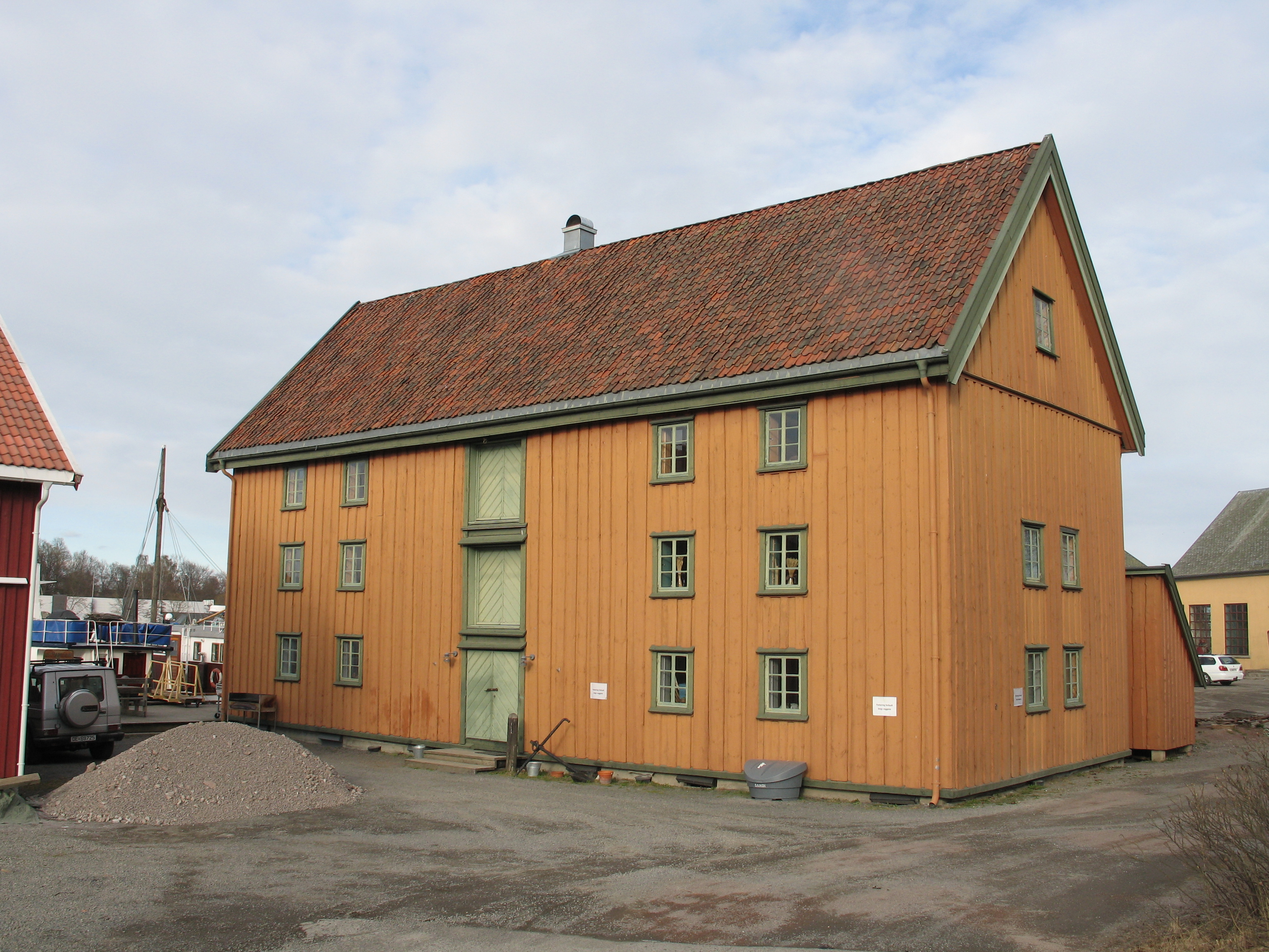 Riggerloftet på Tønsberg kystkultursenter på Teie